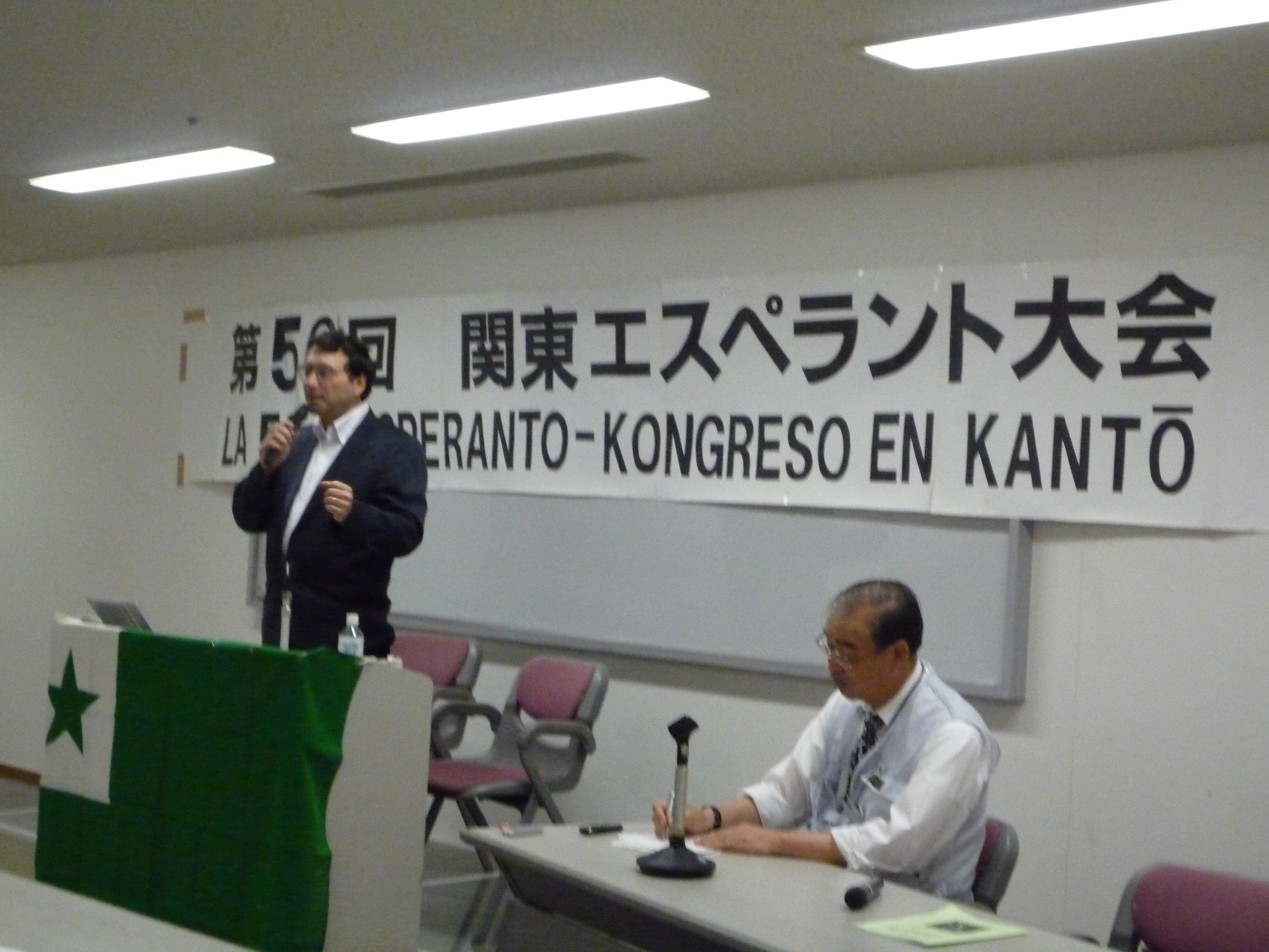 58-a Esperanto-Kongreso en Kanto, Nipono (Japanujo) en 2009. S-ro Halpen, poligloto loĝanta en Japanio dum longa tempo, prelegas pri sia sperto de lingva lernado. Sidante tradukas s-ro Sasaki.